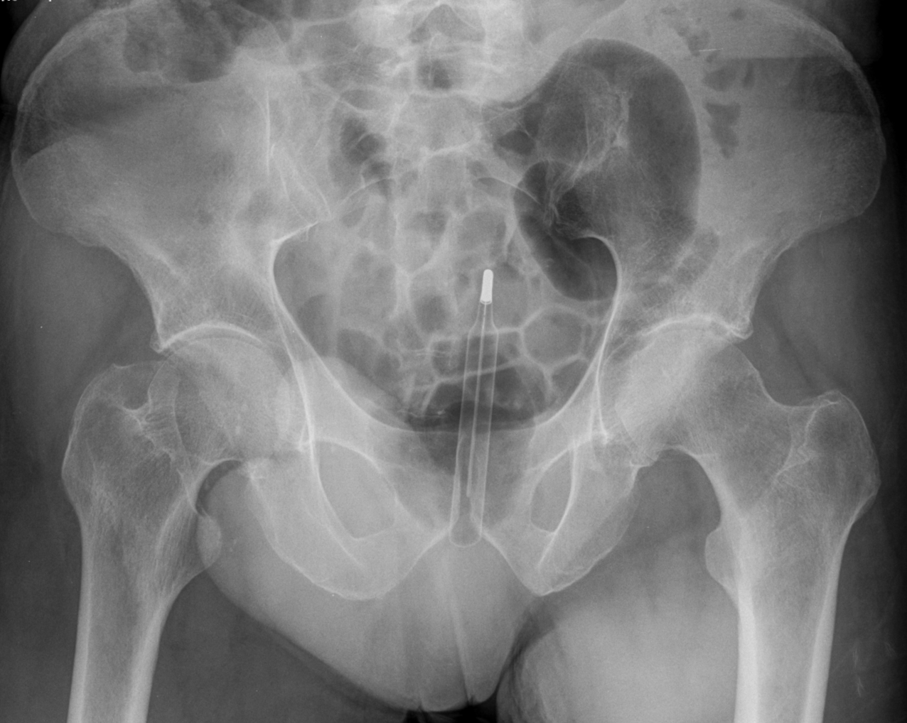 Fieberthermometer rektal eingeführt und verloren.